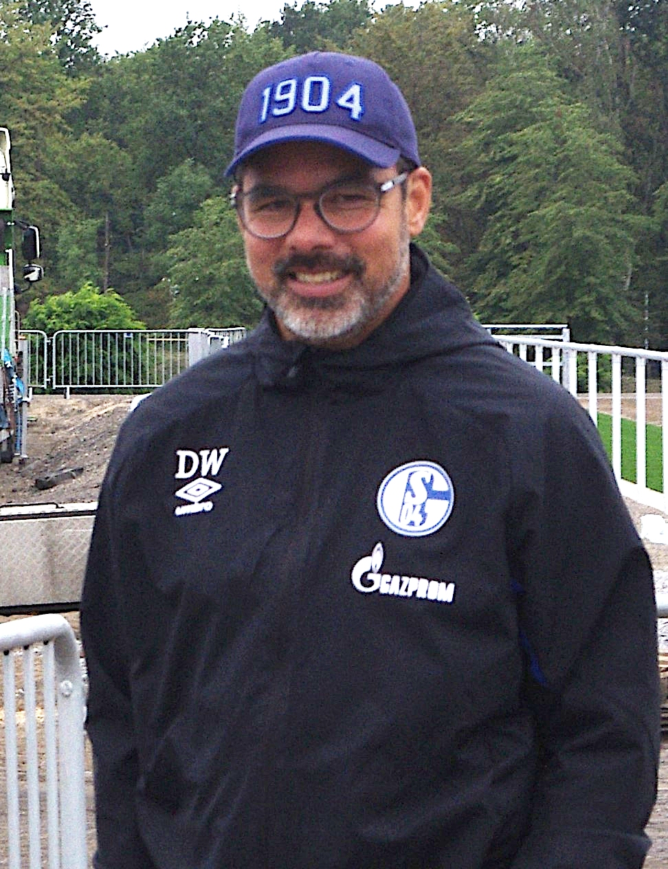 David Wagner nach dem Schalketraining am 11. September 2019